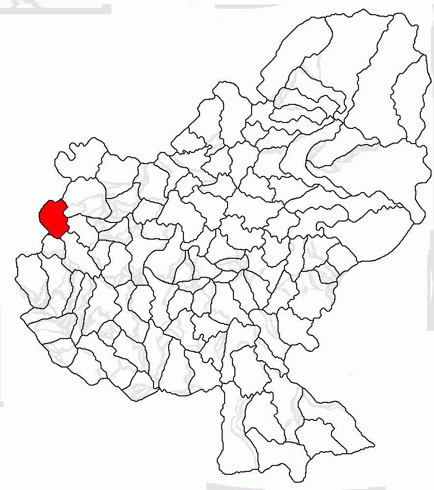 Categorie:Hărţi ale judeţului Mureş